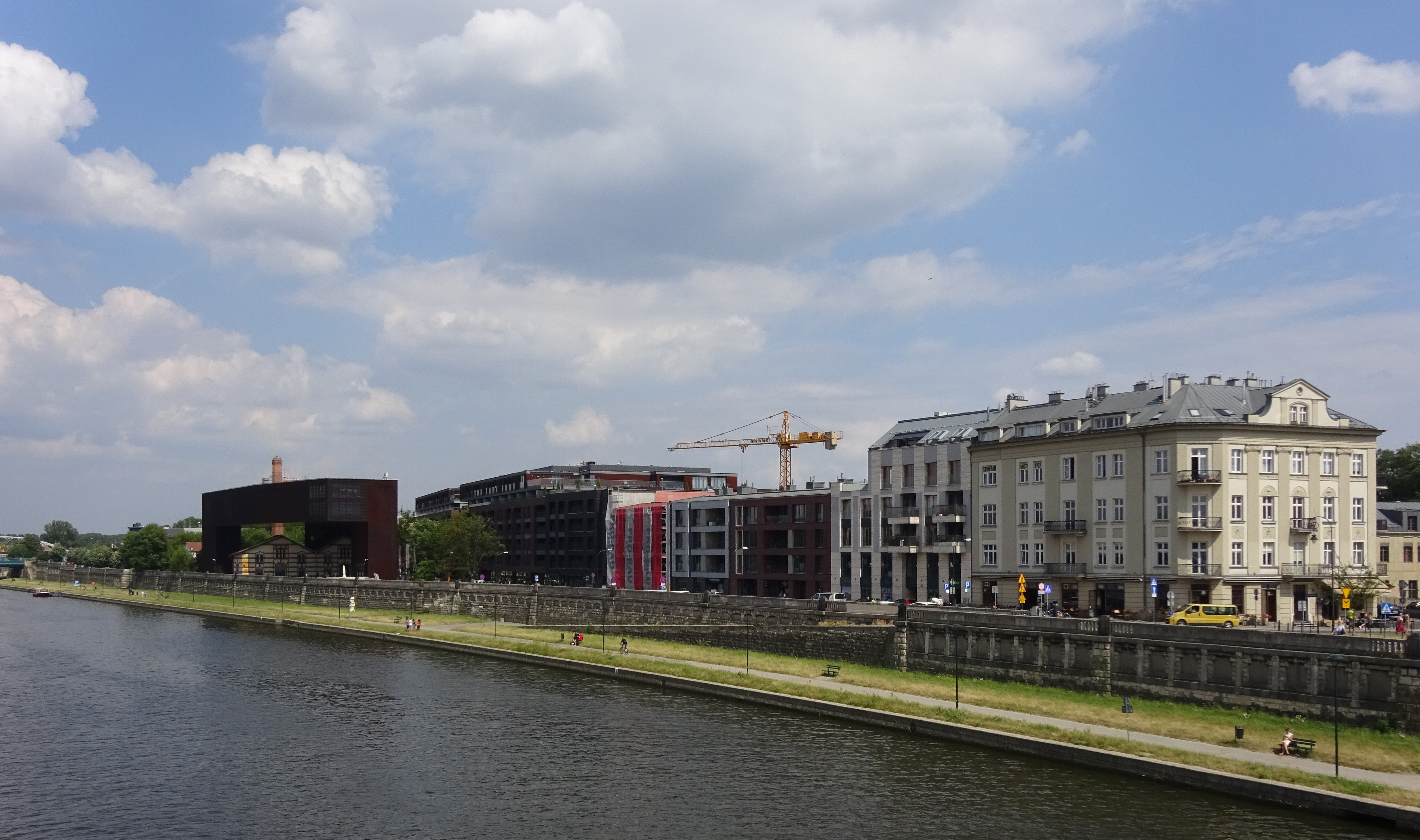 Bulwar Podolski w Krakowie nad Wisłą. Widok ogólny z Kładki Bernatka, od zachodu. 2019